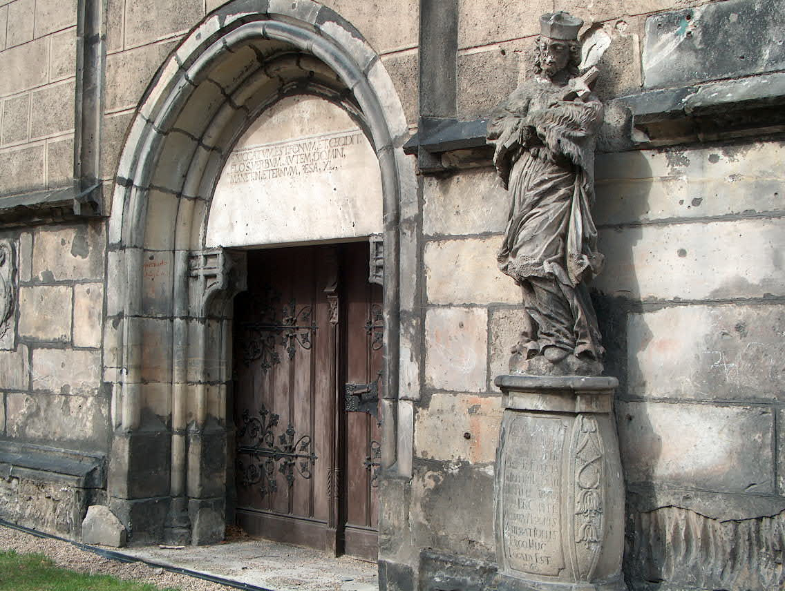 Kościół pod wezwaniem Wniebowzięcia Najświętrzej Marii Panny we Lwówku Ślaskim. Wejście południowe.